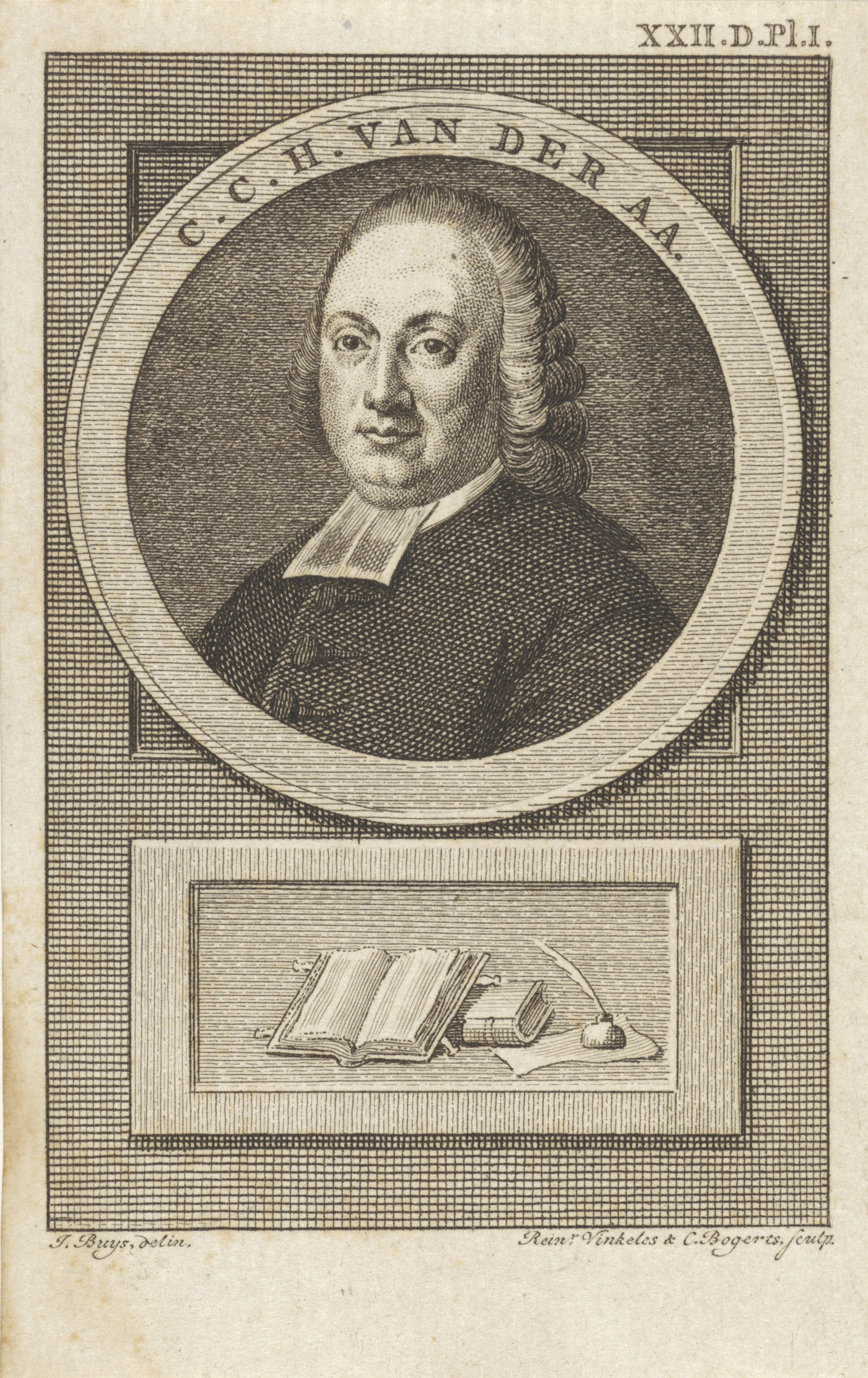 IdentificatieTitel(s): Portret van Christianus Carolus Hendricus van der AaObjecttype: prent boekillustratie Objectnummer: RP-P-1907-3477Catalogusreferentie: Collectie Rijksmuseum-2(2)Opmerking: twee staten in de collectie van het RijksmuseumOpschriften / Merken: verzamelaarsmerk, verso, gestempeld: Lugt 2228Omschrijving: Portret van de Haarlemse predikant Christianus Carolus Hendricus van der Aa. Rechtsboven: XXII D. Pl. I.VervaardigingVervaardiger: prentmaker: Reinier Vinkeles (I) (vermeld op object)prentmaker: Cornelis Bogerts (vermeld op object)naar tekening van: Jacobus Buys (vermeld op object)Plaats vervaardiging: AmsterdamDatering: 1783 - 1795Fysieke kenmerken: etsMateriaal: papier Techniek: etsenAfmetingen: blad: h 97 mm × b 61 mmToelichtingPrent gebruikt in: Fokke, Jan. Geschiedenissen der Vereenigde Nederlanden voor de vaderlandsche jeugd Ie-XXVste deel. Amsterdam: Johannes Allart, 1783-1795. Deel XXII.OnderwerpWat: ink-wellbook - MM - book openWie: Christianus Carolus Hendricus van der AaVerwerving en rechtenVerwerving: aankoop 1905Copyright: Publiek domein